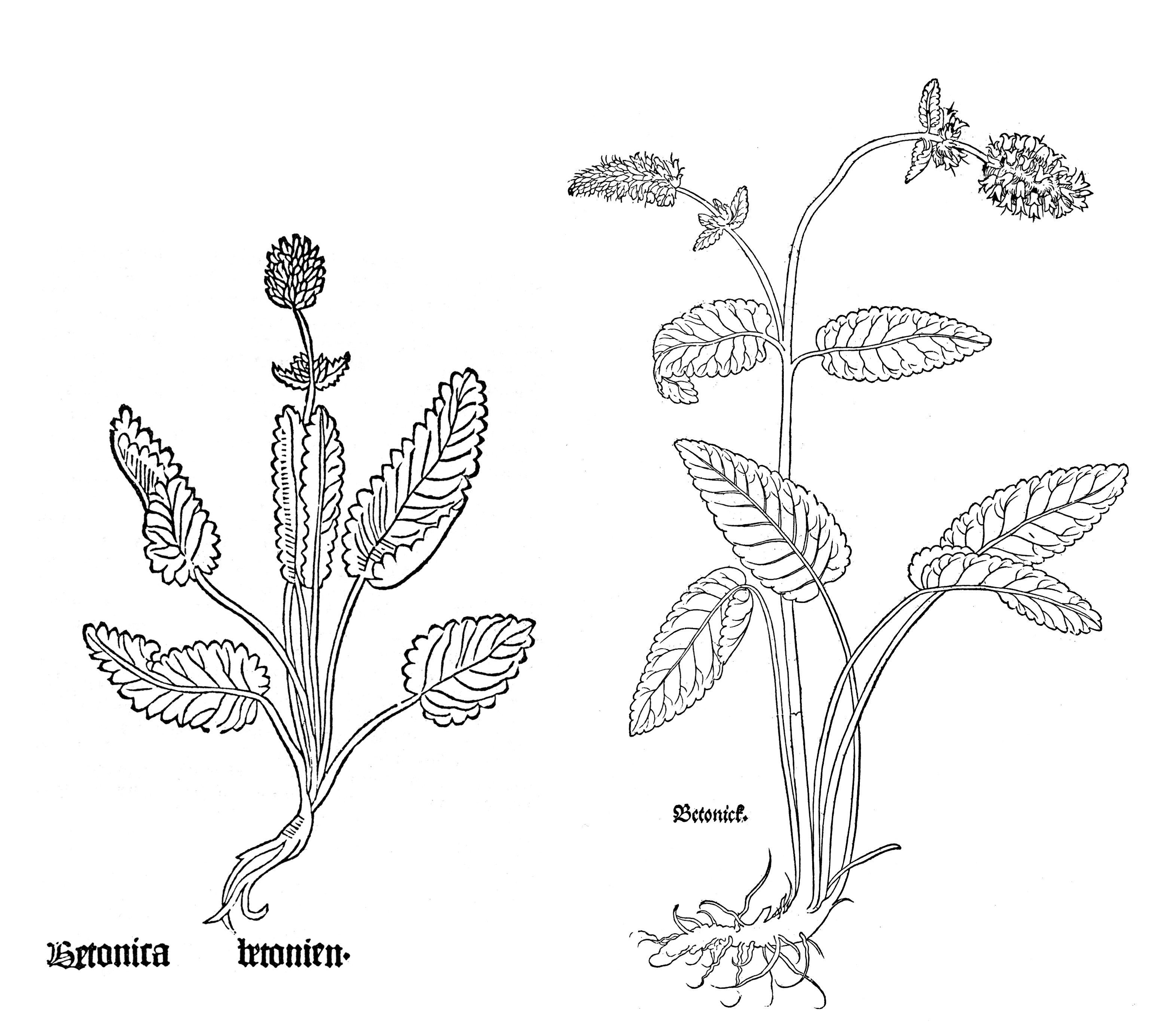 Abbildungen von Betonica officinalis